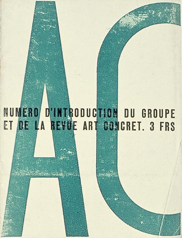 Omslag voor het introductienummer van Art Concret. Drukwerk. Amsterdam, Instituut Collectie Nederland. Inventory number AB5033.